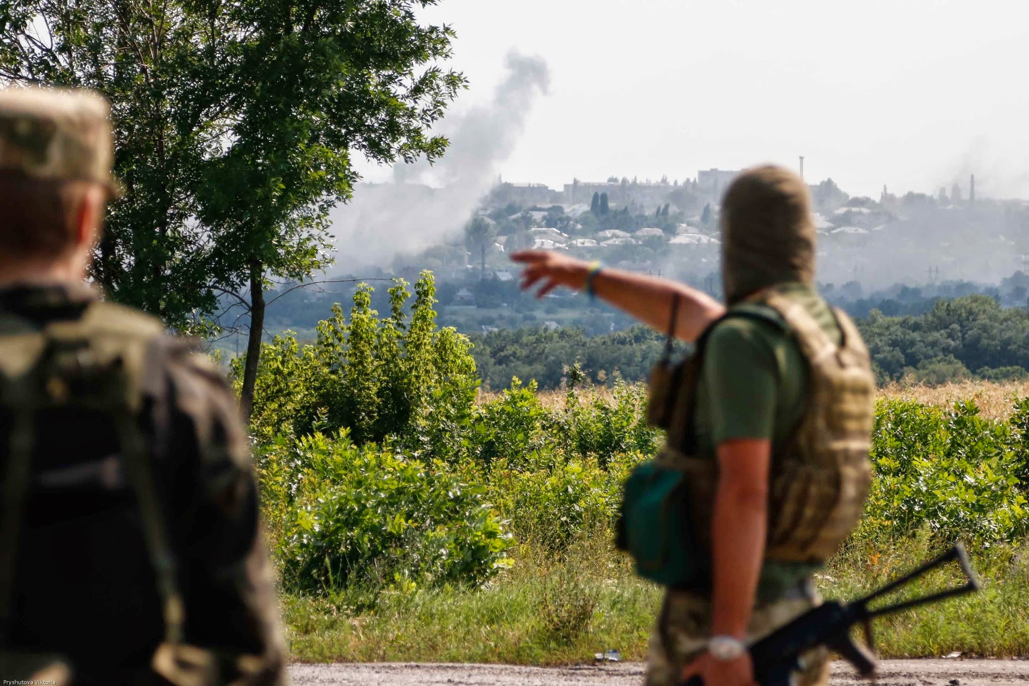 Батальон «Донбасс» под Первомайском